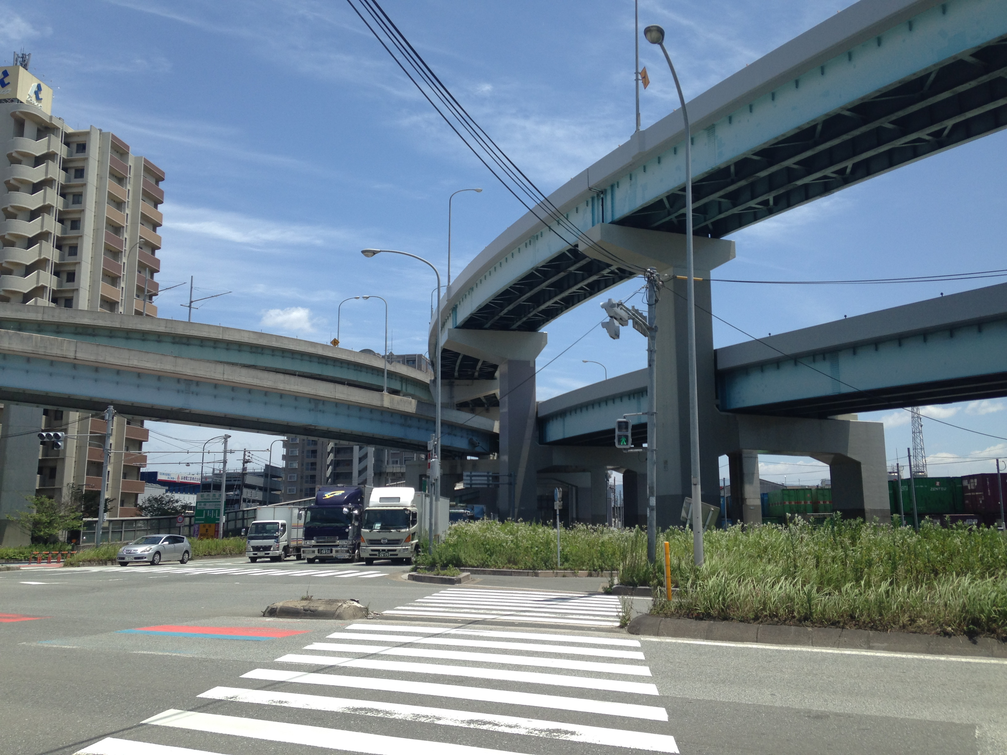 福岡都市高速貝塚JCT